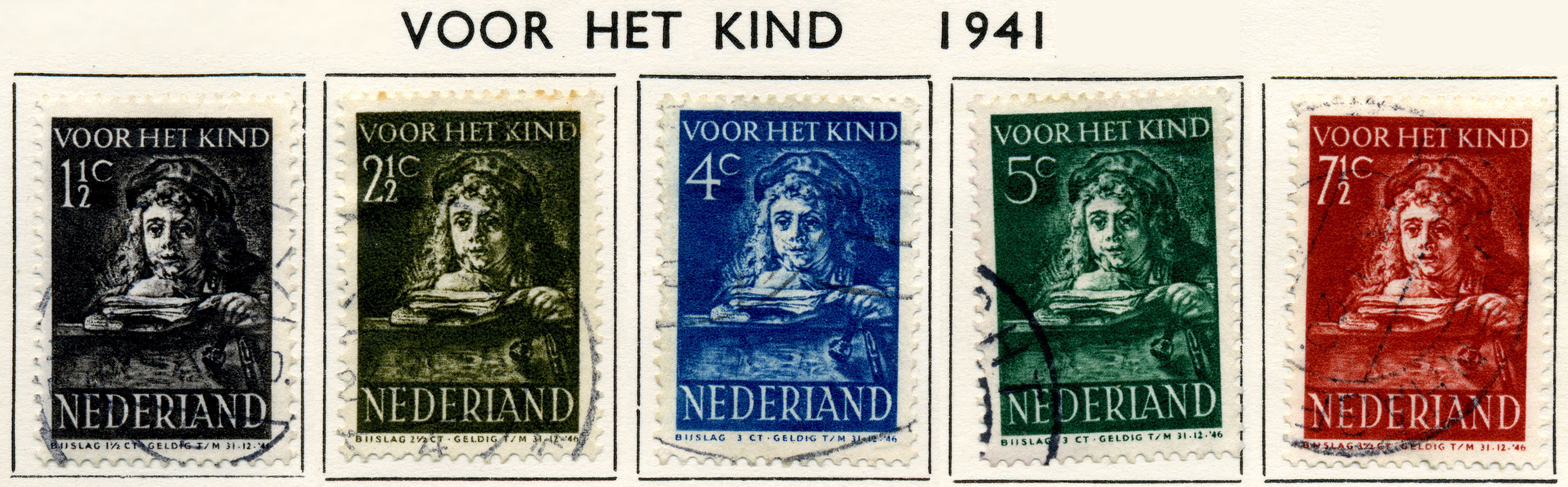 Kinderzegels (1941) Rembrandt’s zoon Titus; NVPH nr 397-401. Ontwerp van Anton van der Valk naar een schilderij van Rembrandt.